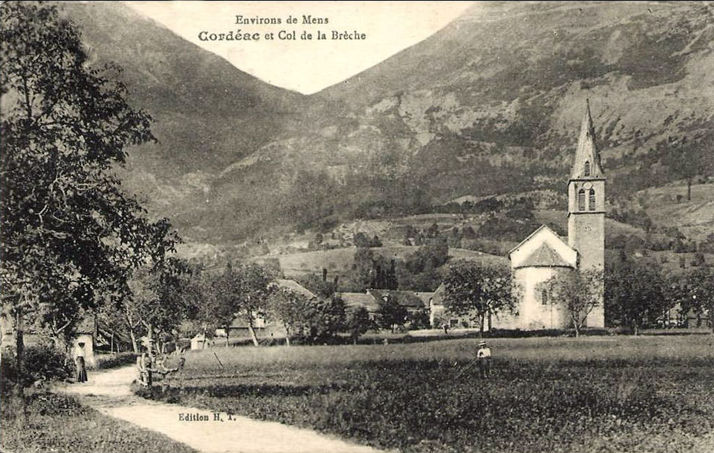 carte postale ancienne de Cordéac, église.